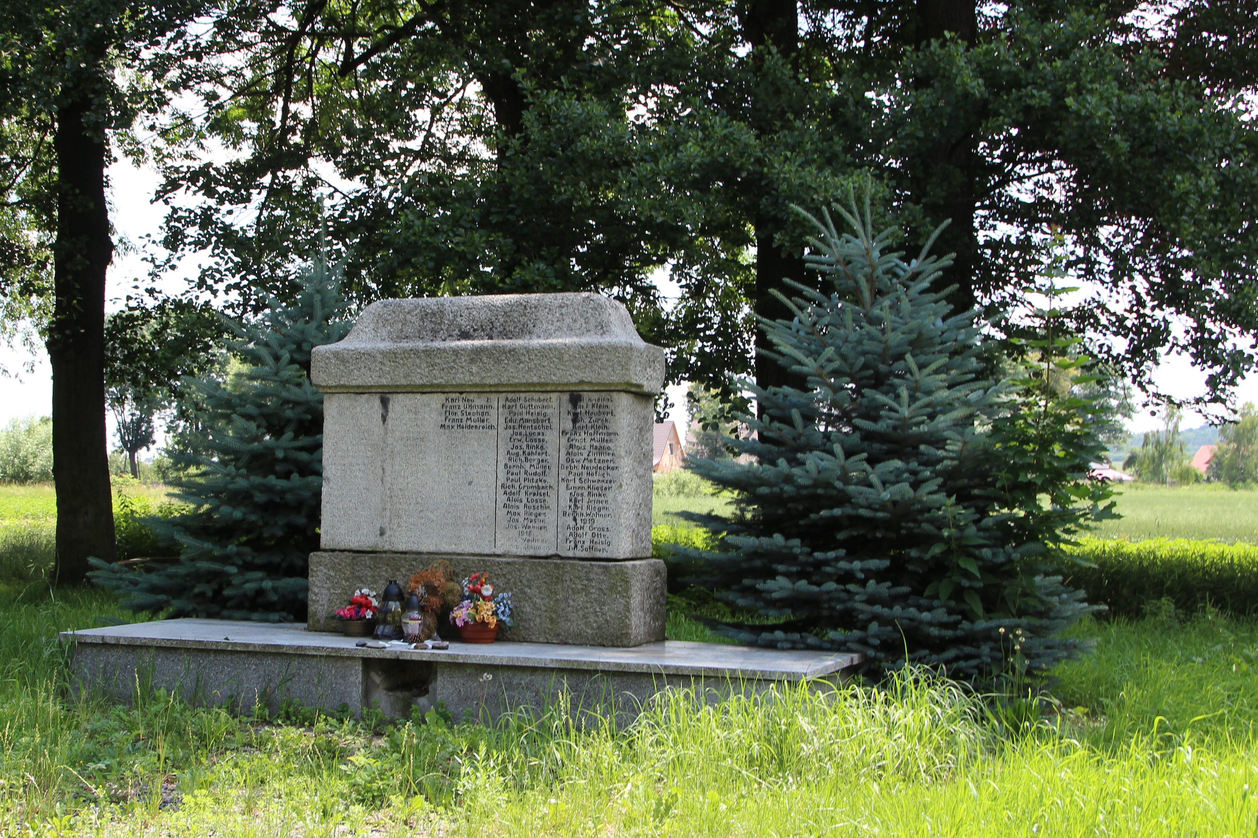 Łąka Prudnicka -wieś w Polsce w województwie opolskim, w powiecie prudnickim w gminie Prudnik.